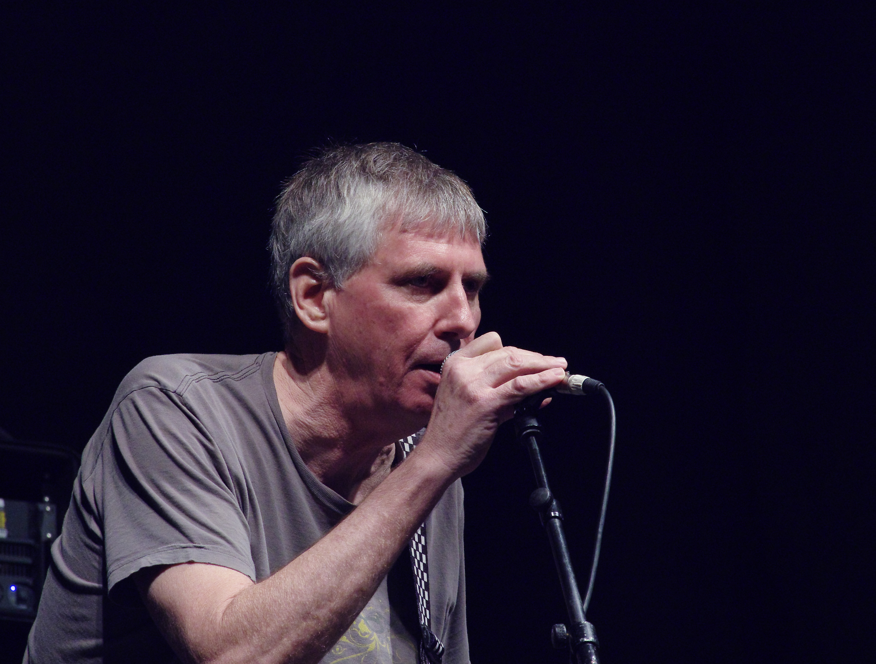 Black Flag beim Ruhrpott Rodeo 2013 in Hünxe. Besetzung: Dave Klein (Bass), Greg Ginn (guitar), Ron Reyes (voc), Gregory Moore (dr)